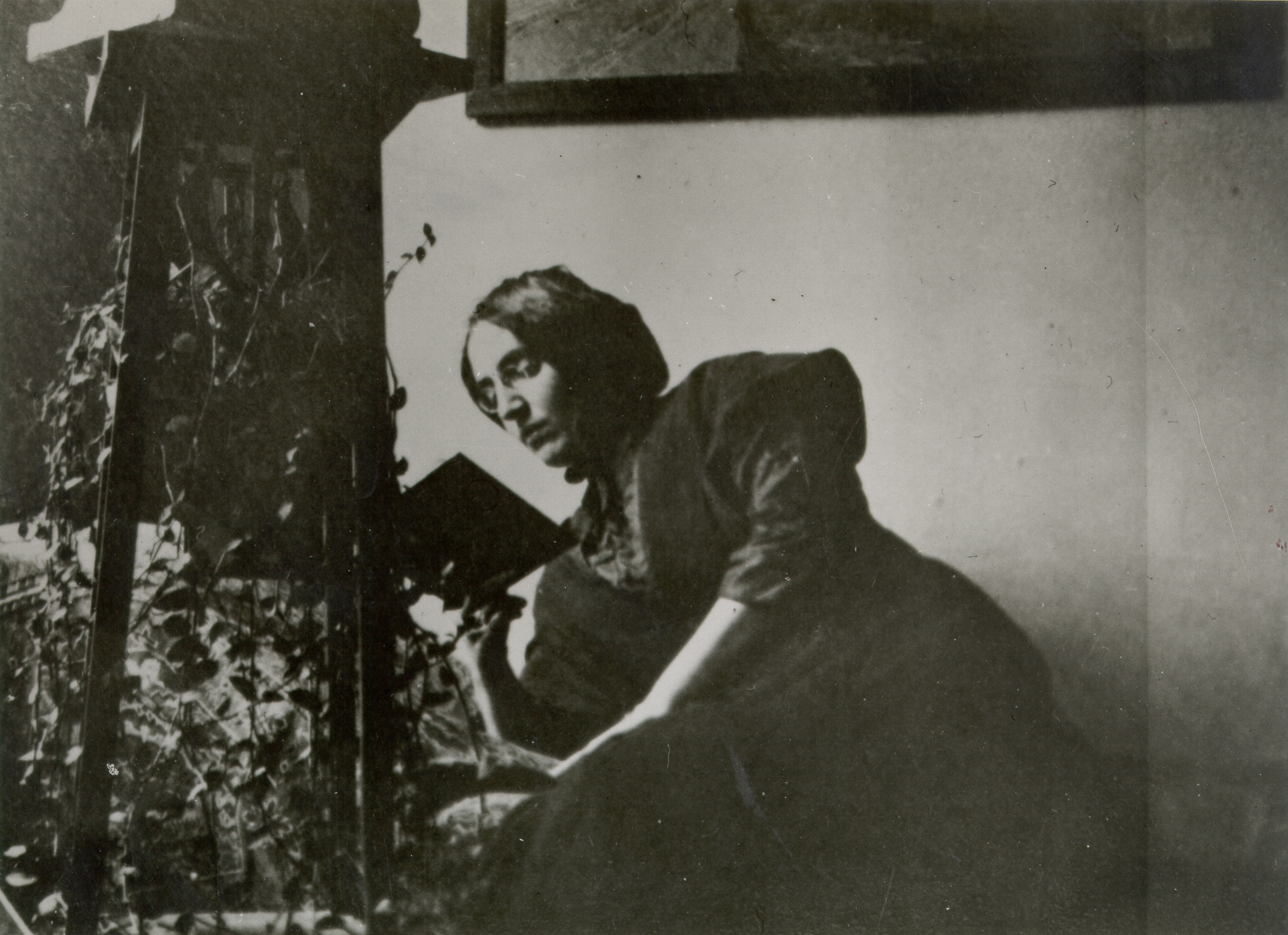 Zofka Kveder (1878-1926), Slovene writer.